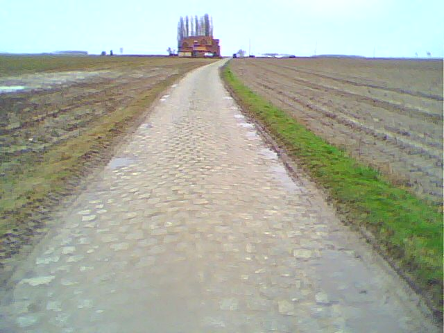 2ème partie du Carrefour de l'Arbre